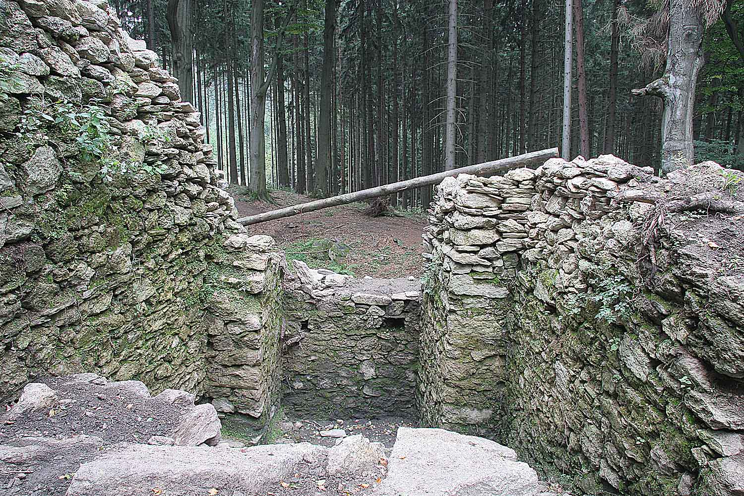 PP Štarkov - ruins, district Žďár nad Sázavou, Czech Republic autor:Prazak date:6. 9. 2006